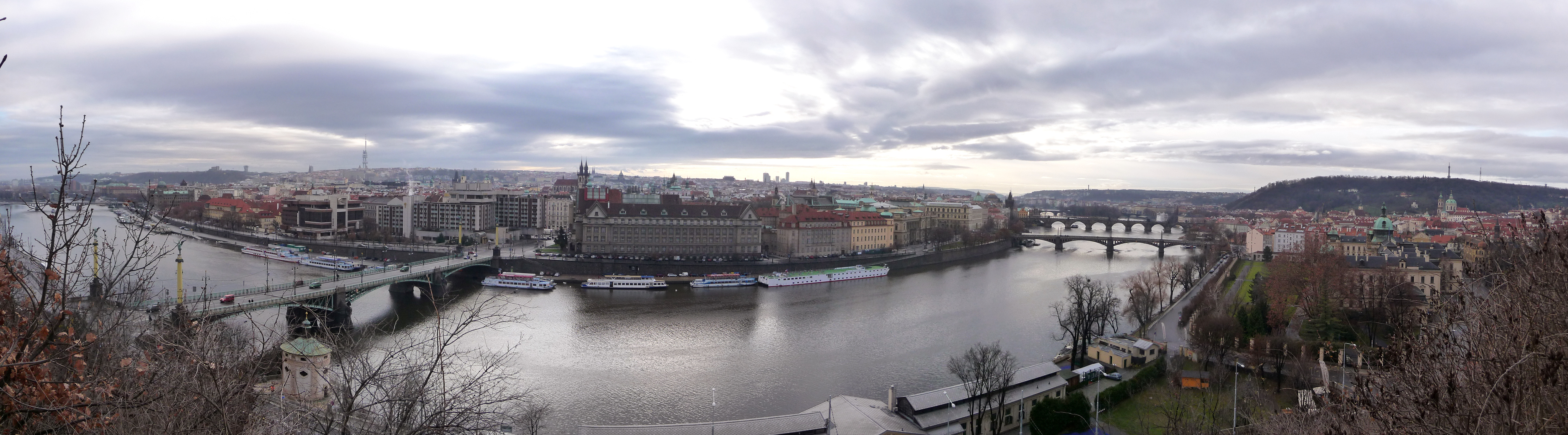 Nordseite der Innenstadt von Prag, aufgenommen vom Platz des ehemaligen Stalin-Denkmals aus, Panorama erzeugt mit Hugin